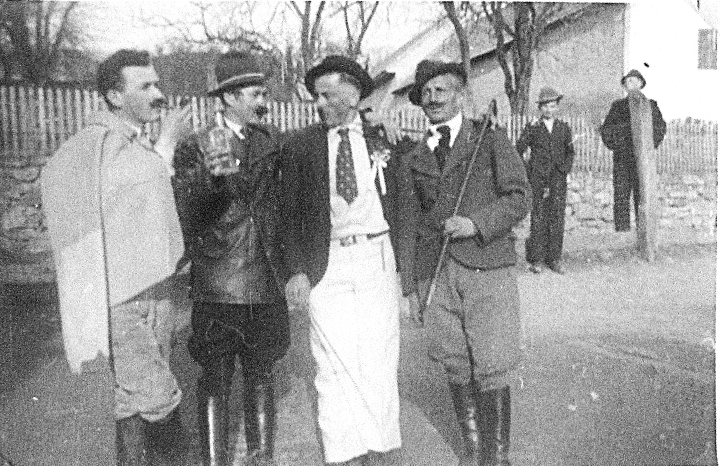 Sedlice členovia ochotníckeho divadelného súboru Poľana v roku 1942